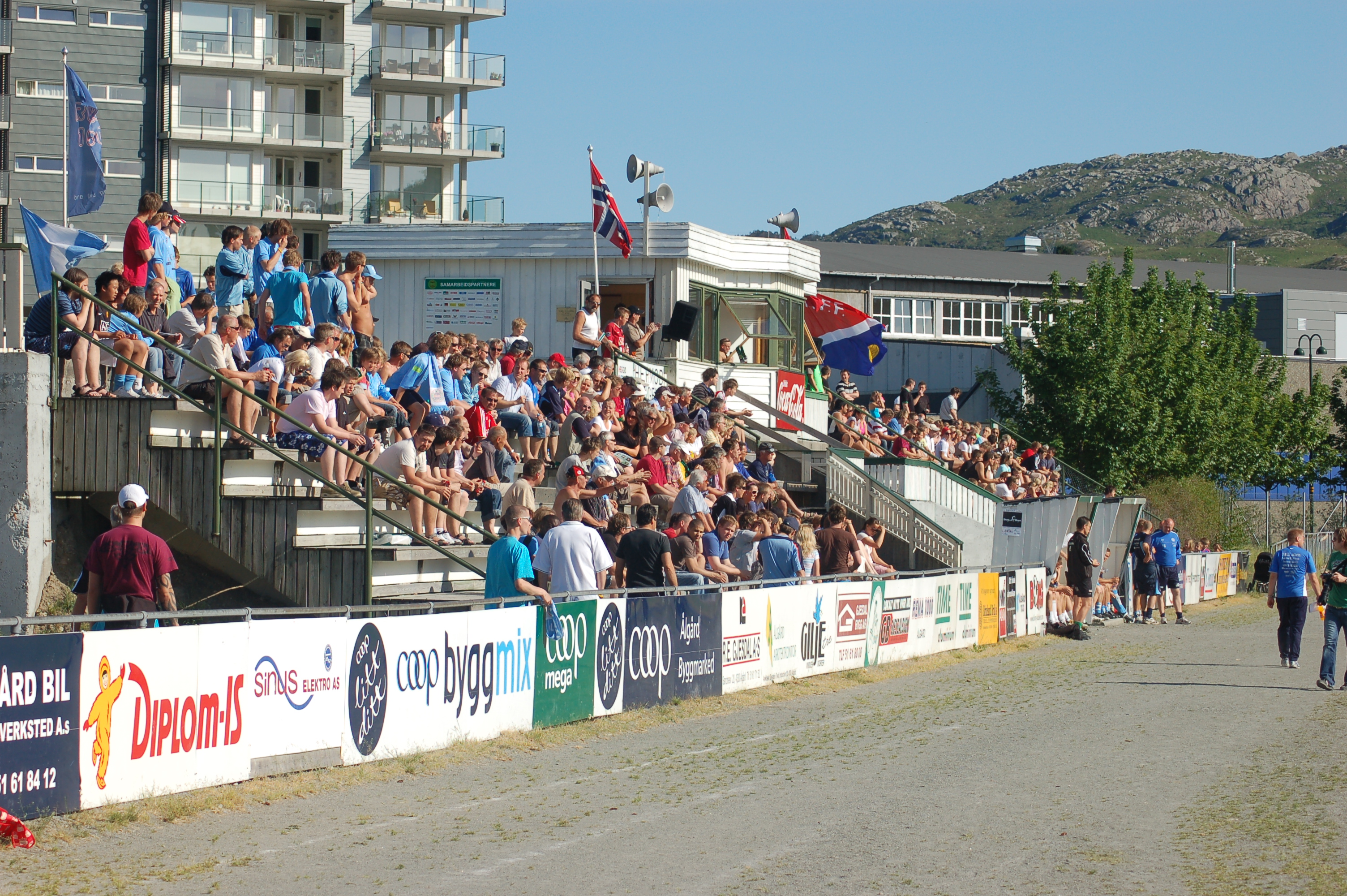 Tribunen på Ålgård stadion i NM-kampen mellom Ålgård FK og Sandnes Ulf 4. juni 2008.